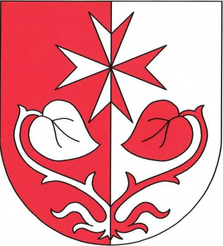 znak,Zdětín , okres Mladá Boleslav